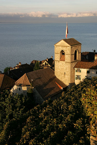 Kirche vom Winzerdorf St-Saphorin im Lavaux